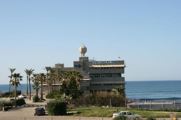 המכון לחקר ימים ואגמים